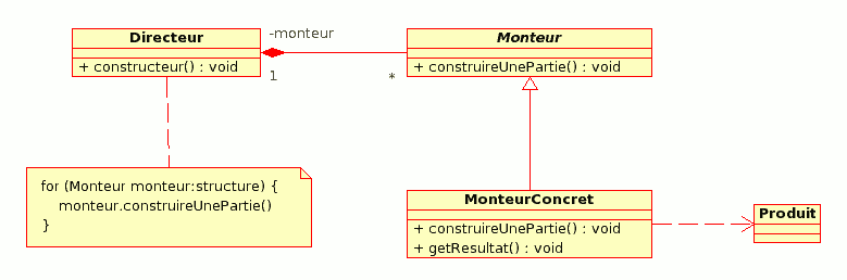 Diagramme de classes pour le motif de conception : MonteurTraduction en français des classes et méthodes.